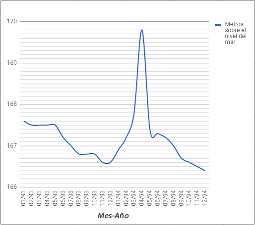 Limnígrafo que muestra la variación de nivel piezométrico que sufrió un pozo situado al sur de la depresión de Berja, Almería, tras el Terremoto de Berja de 1993